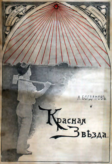 Научно-фантастическая повесть А.А.Богданова (1873-1928) "Красная звезда" (1908)